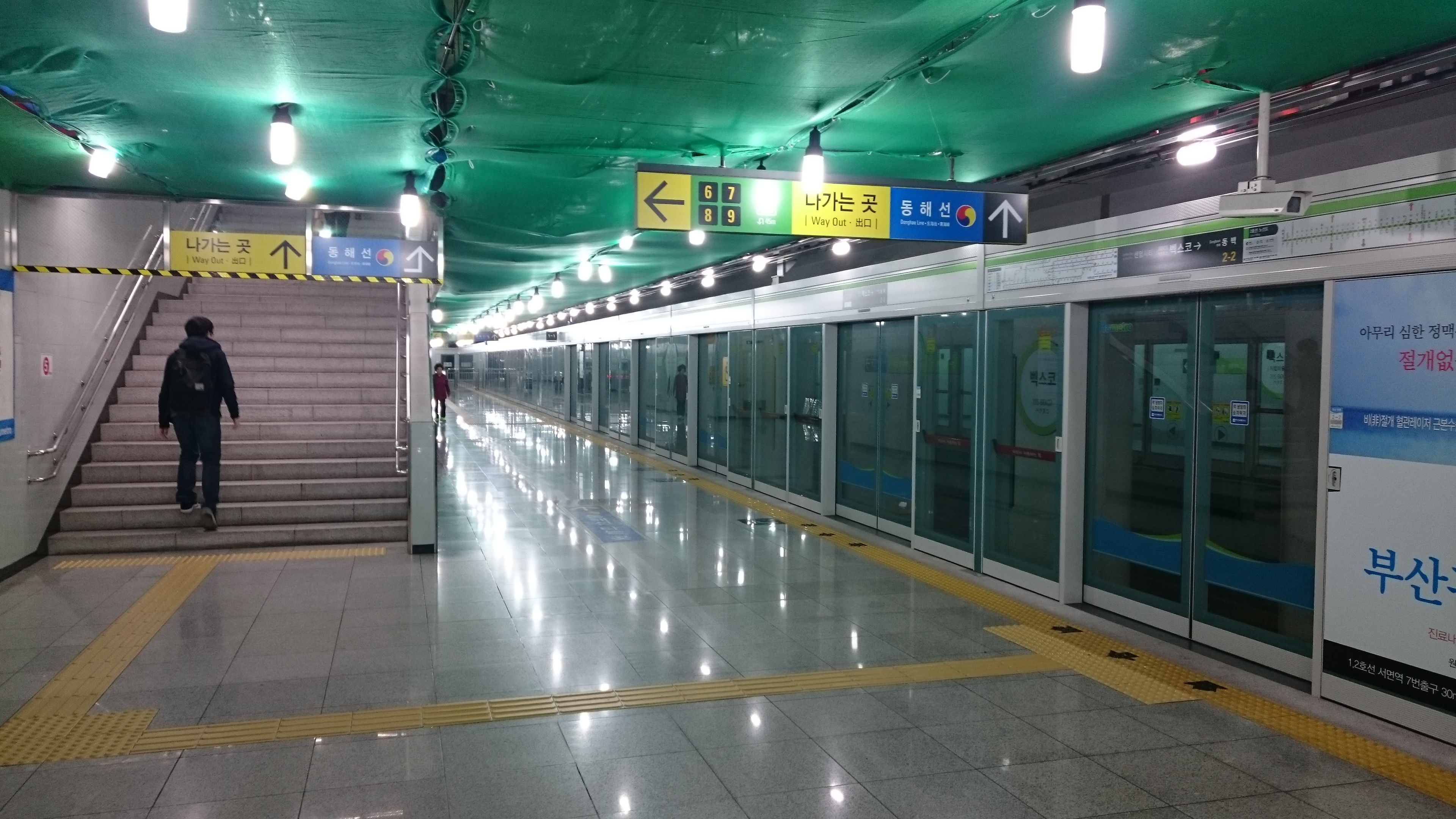 釜山都市鉄道2号線BEXCO駅ホームドア